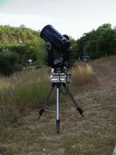 Een voorbeeld van een Schmidt-Cassegrain telescoop met een diameter van 10"(25 cm)